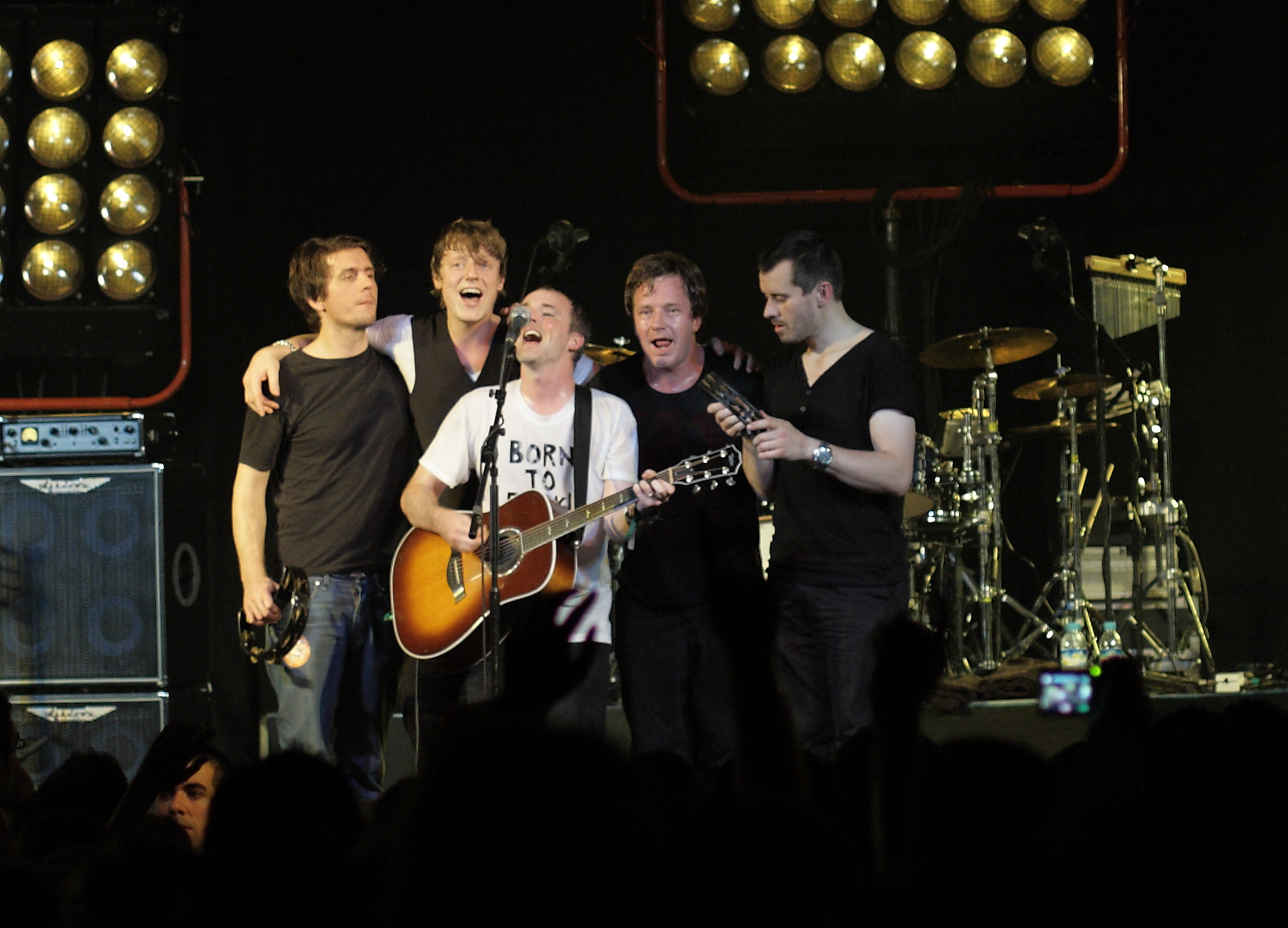 Travis en la Riviera, Madrid, 2007